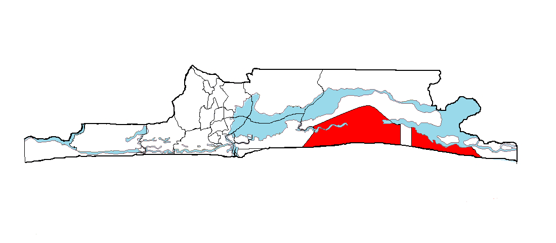 Ubicación de Ibeju-Lekki en el Estado de Lagos